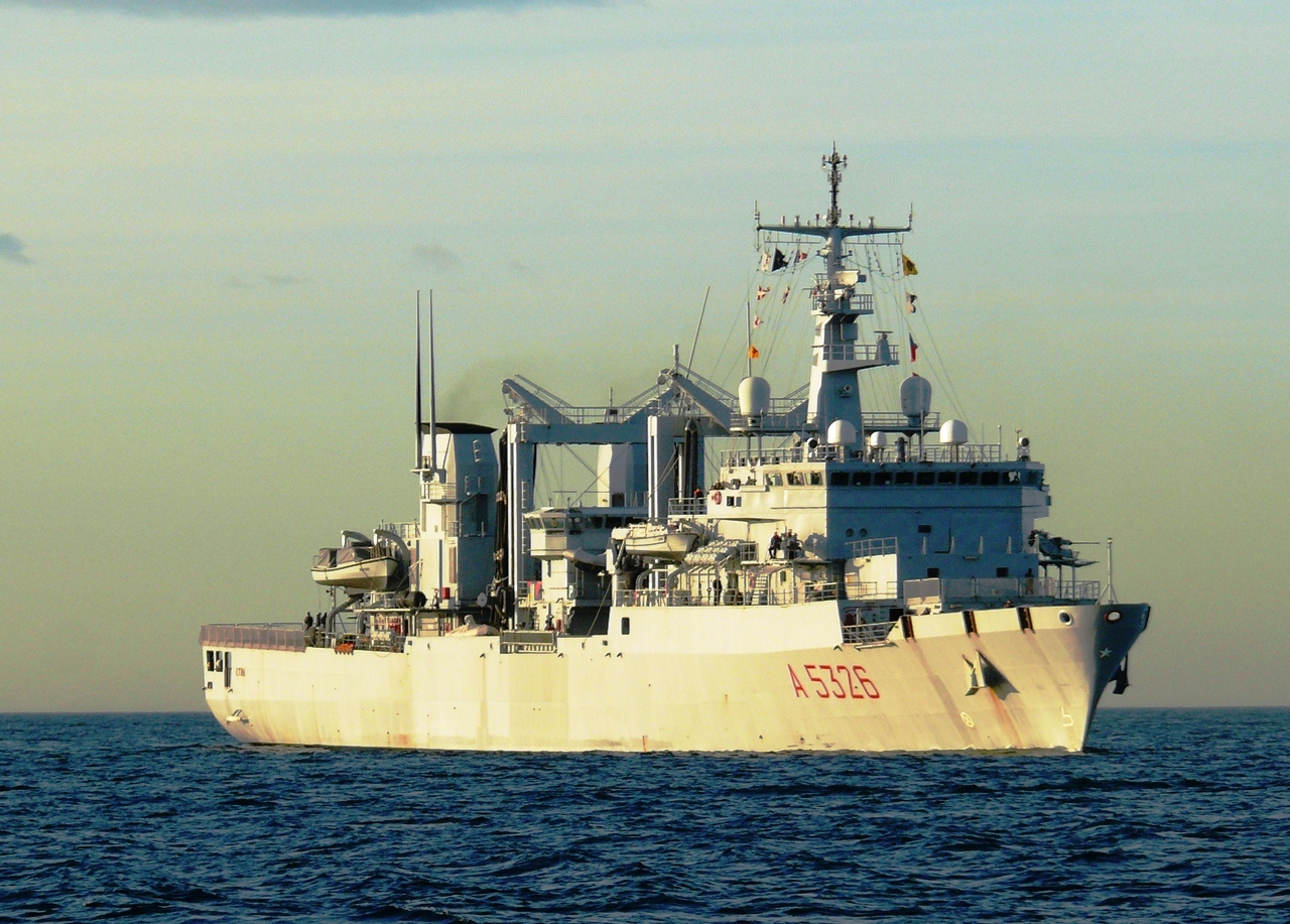 Nave Etna a Cartagena (Spagna)